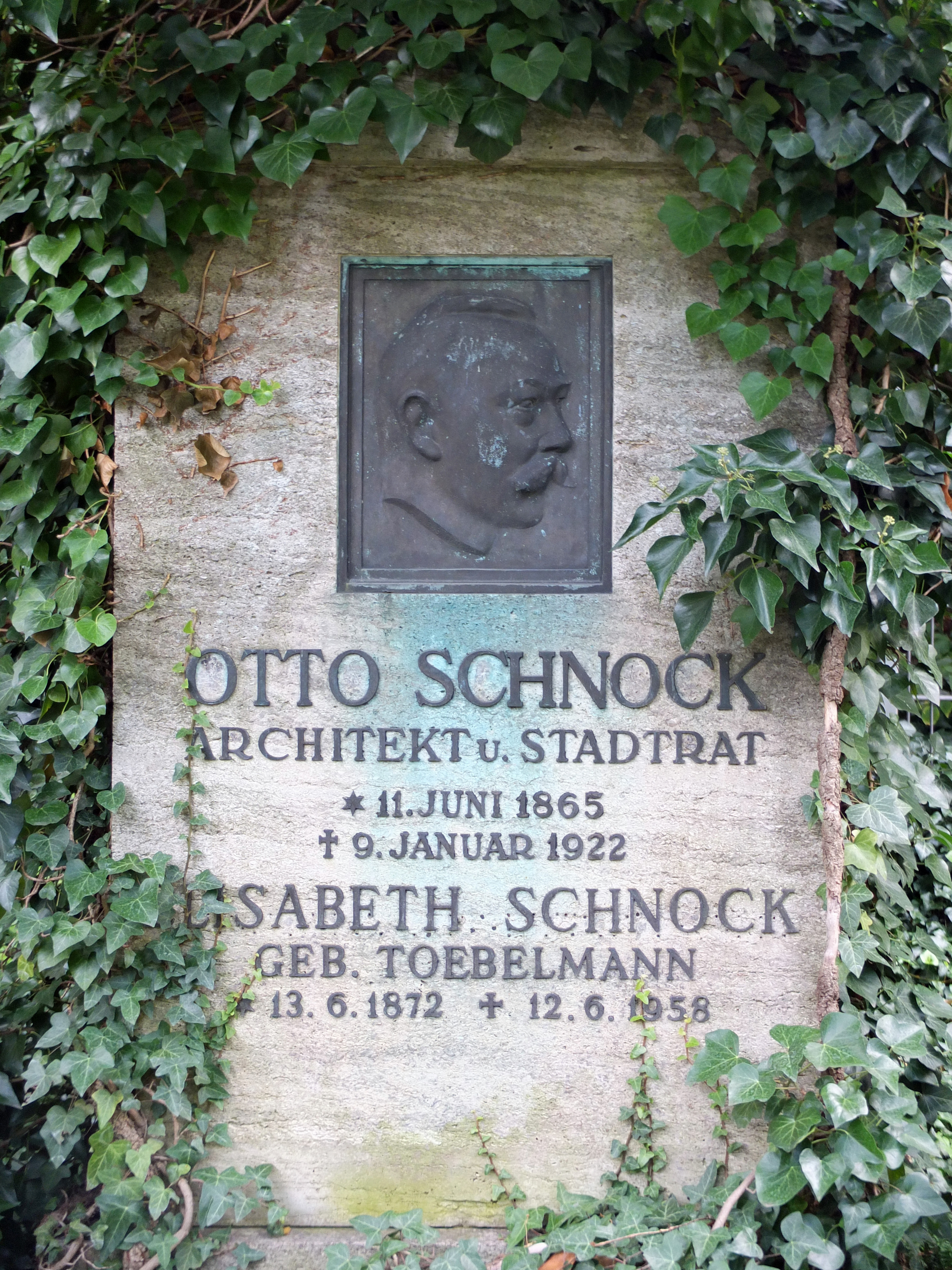 Grabstein des Architekten und Stadtrats Otto Schnock und seiner Frau Elisabeth Schnock, geb. Toebelmann auf dem Friedhof Wilmersdorf in Berlin